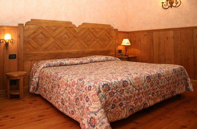 Camera in stile alpino di un albergo a Courmayeur, Valle d'Aosta, Italia.